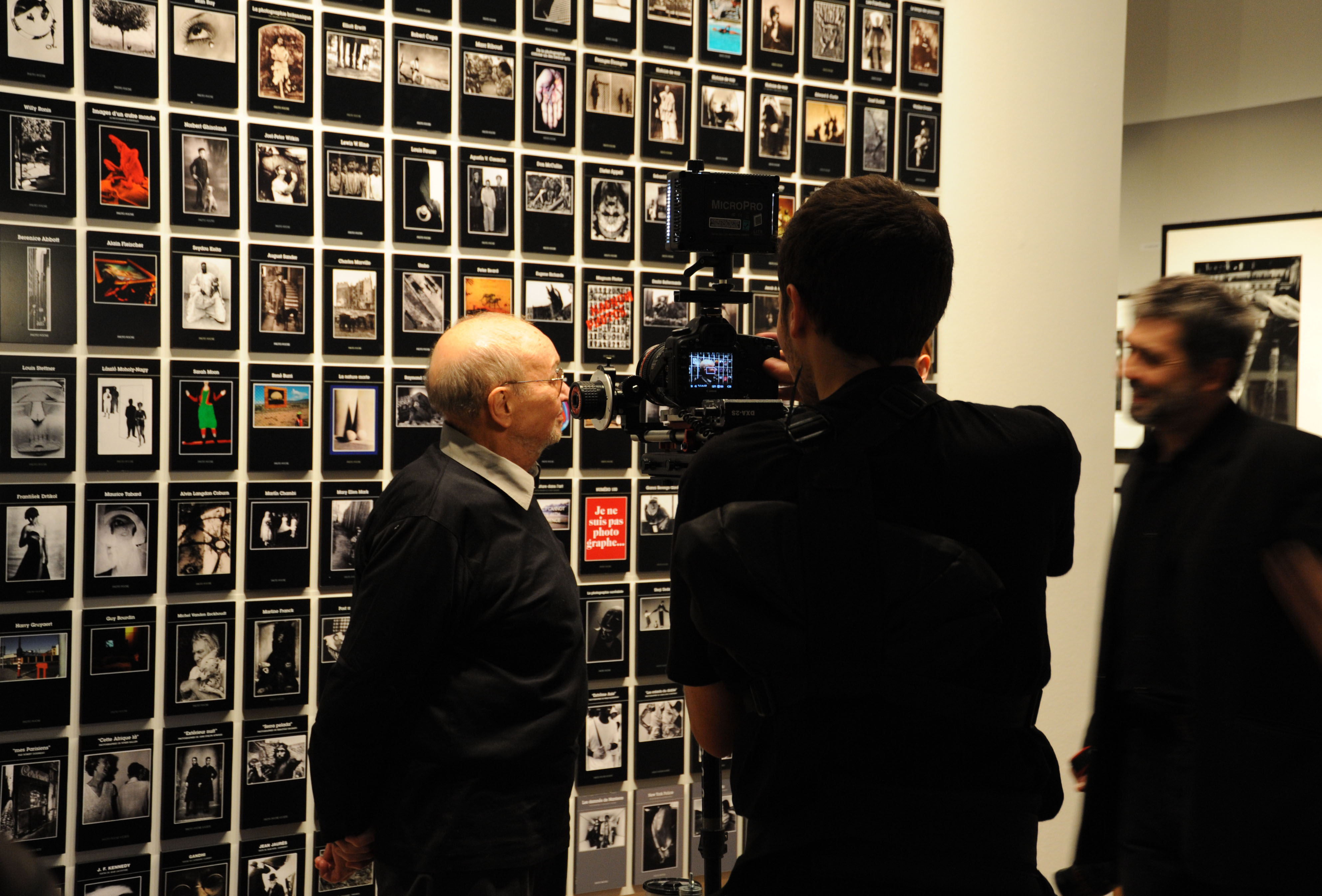 Rétrospective Robert Delpire à la Maison Européenne de la Photographie, Paris